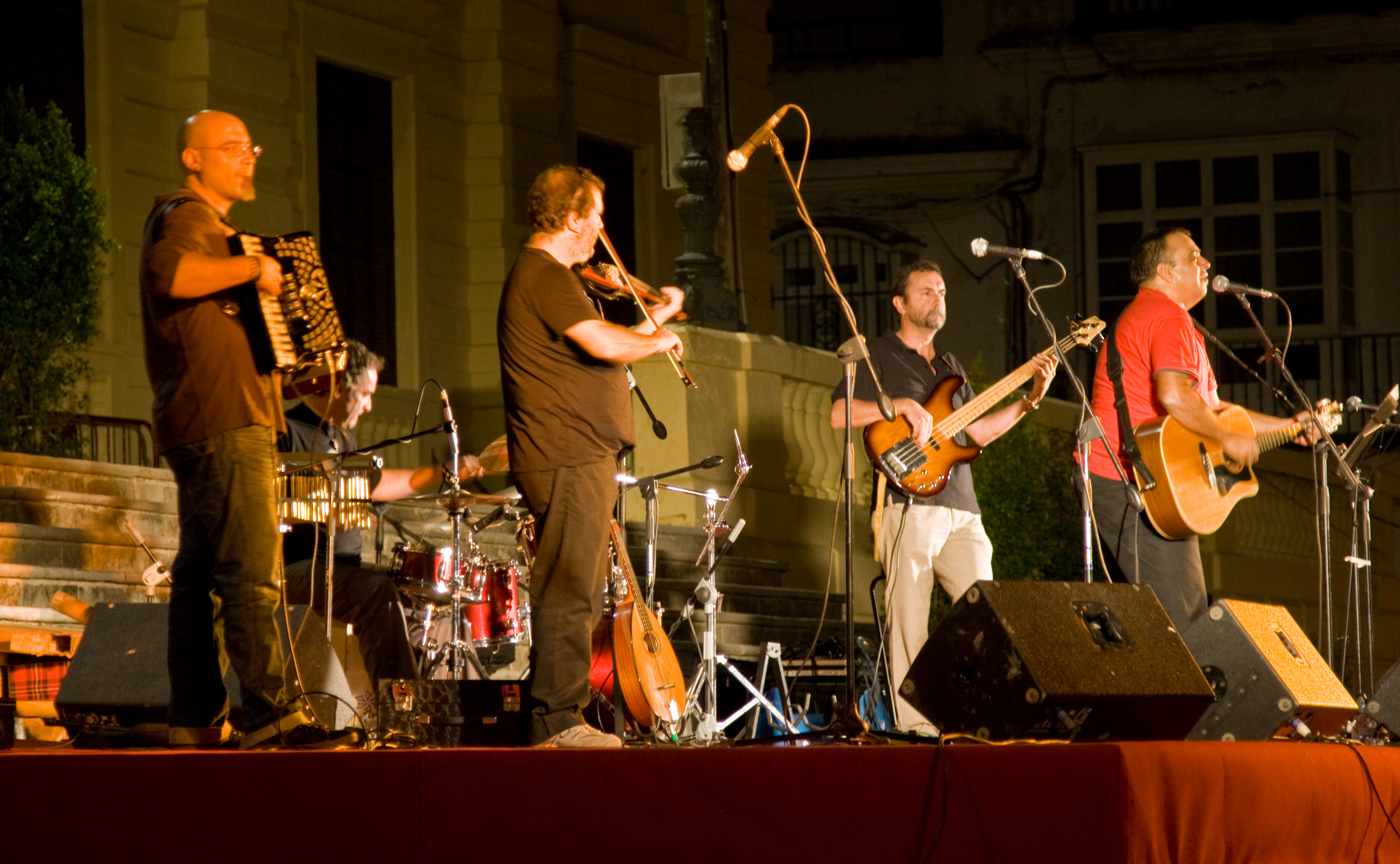 Contradanza en concierto en San Fernando (Cádiz)